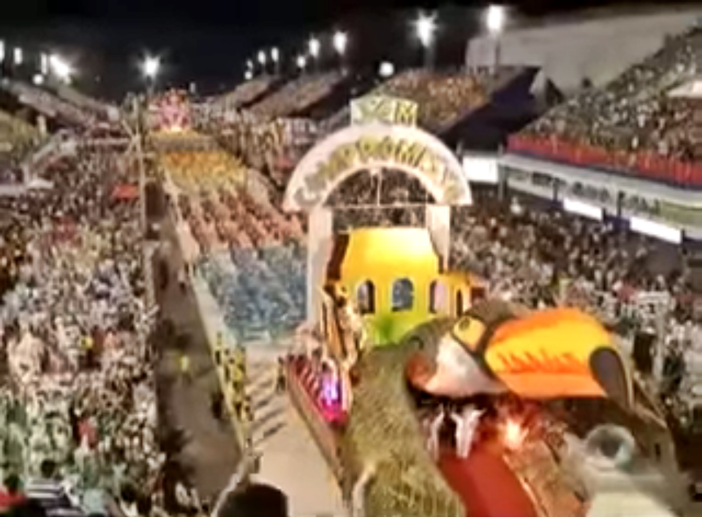 Escola de samba Sem Compromisso em desfile no Sambódromo de Manaus, Amazonas, Brasil.